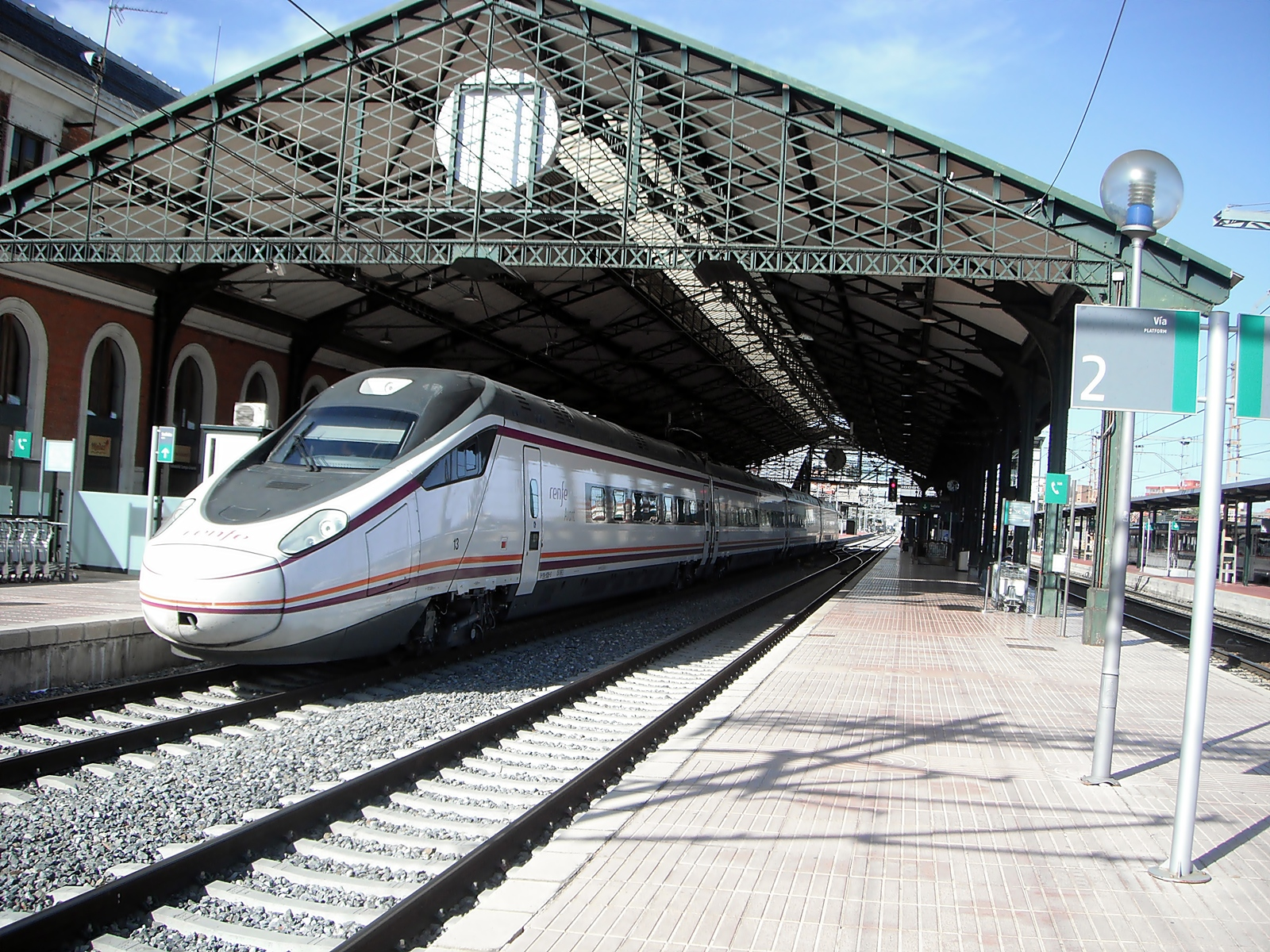 Tren de la serie 114 de Renfe estacionado en la estación de Valladolid-Campo Grande, antes de iniciar el embarque de pasajeros para partir hacia Madrid Chamartín por la línea de alta velocidad